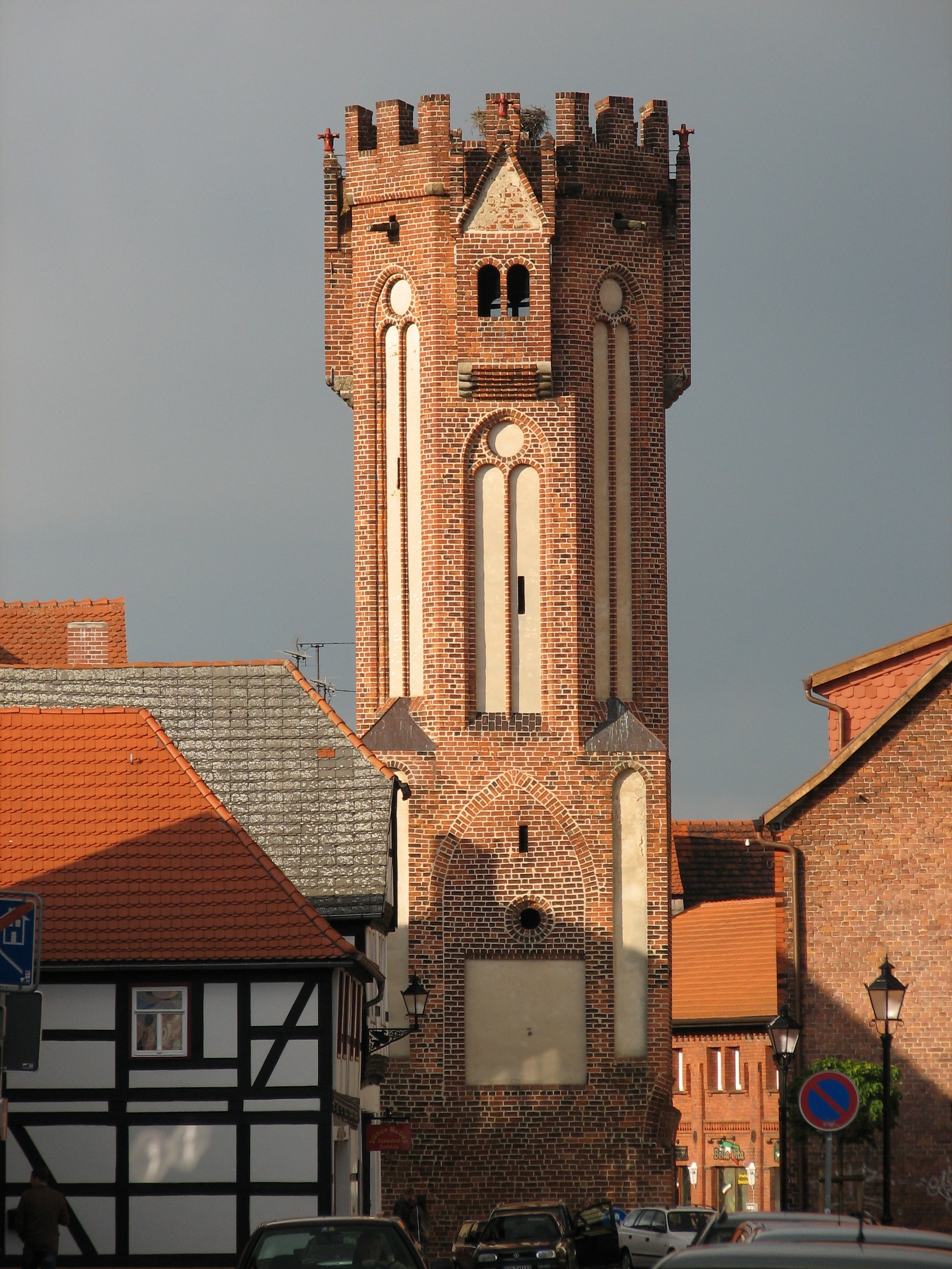 Eulenturm in Tangermünde Sonstiges